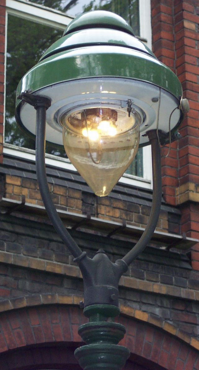 Gaslaterne